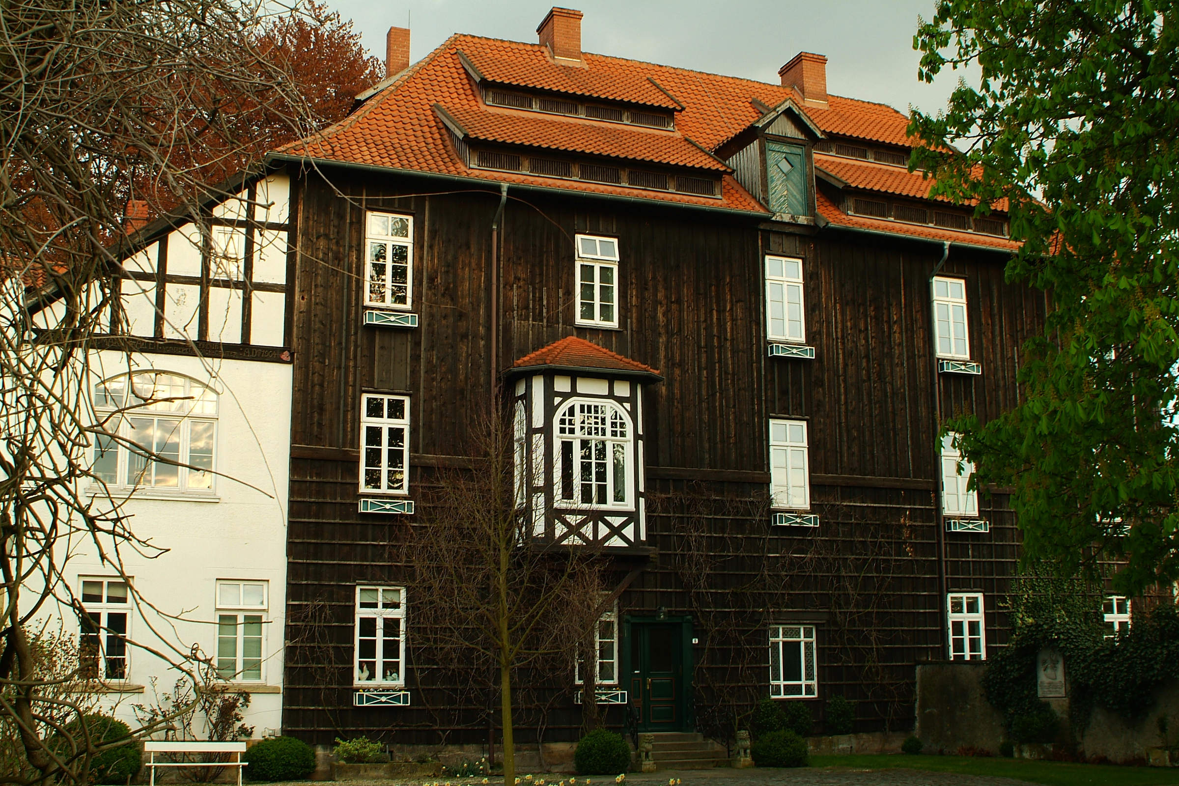 Frontale Hofansicht des Herrenhaus (Baudenkmal), Am Edelhofe 8 in Ricklingen (Stadtbezirk von Hannover).